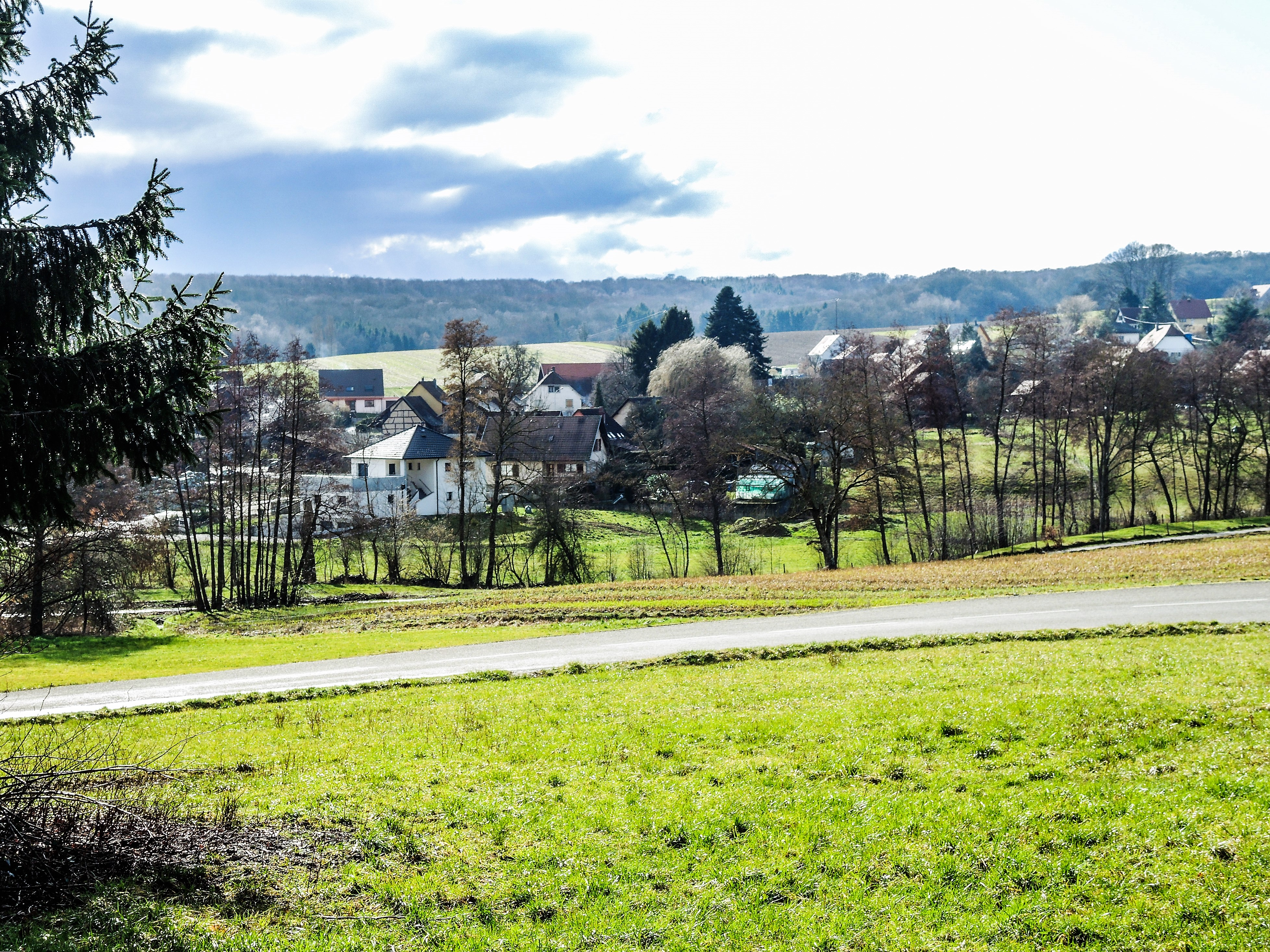 Soppe-le-Haut, vu de la route de Guewenheim. Haut-Soulzbach. Haut-Rhin